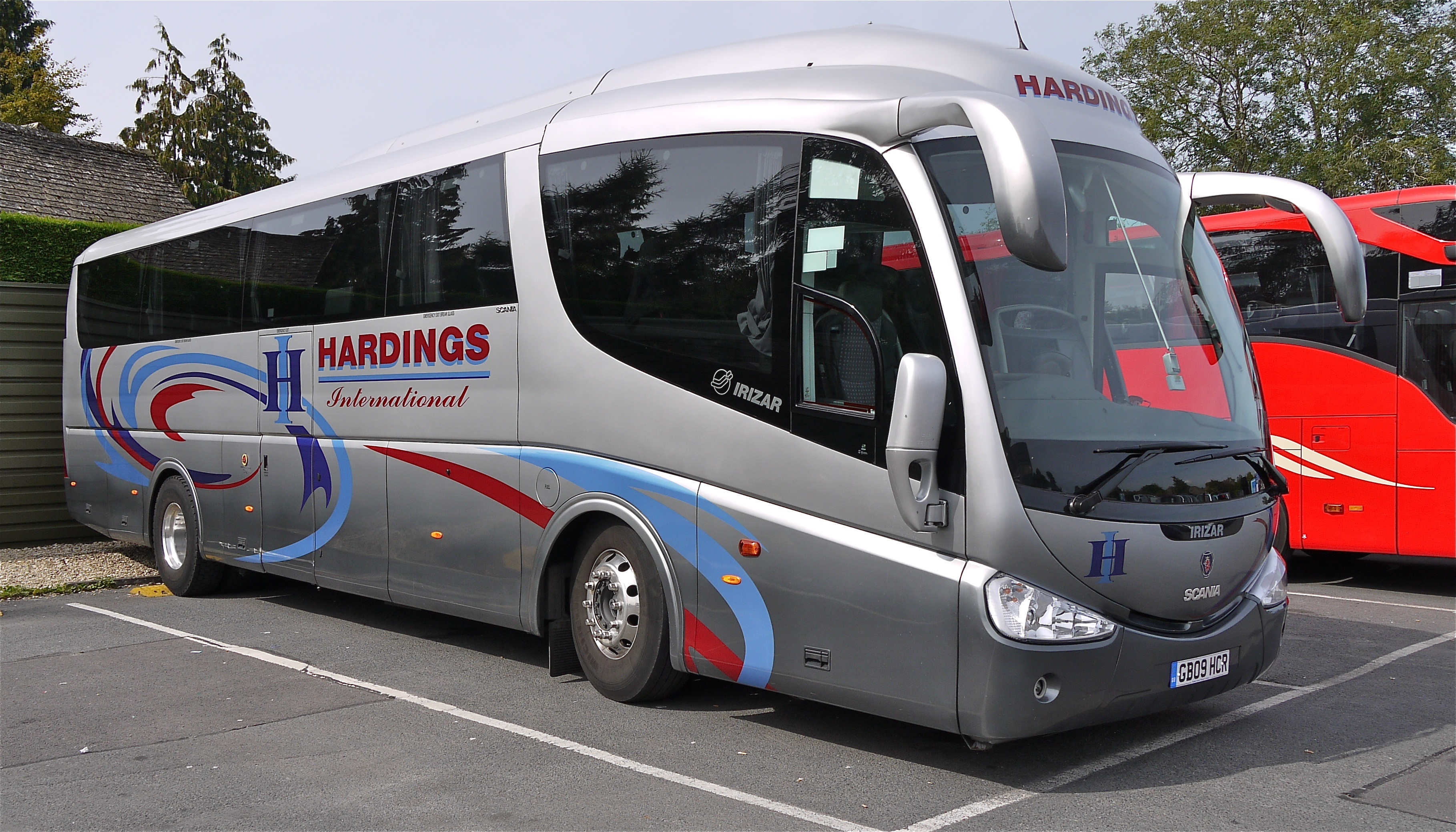 Panasonic G1 14-45 Lens